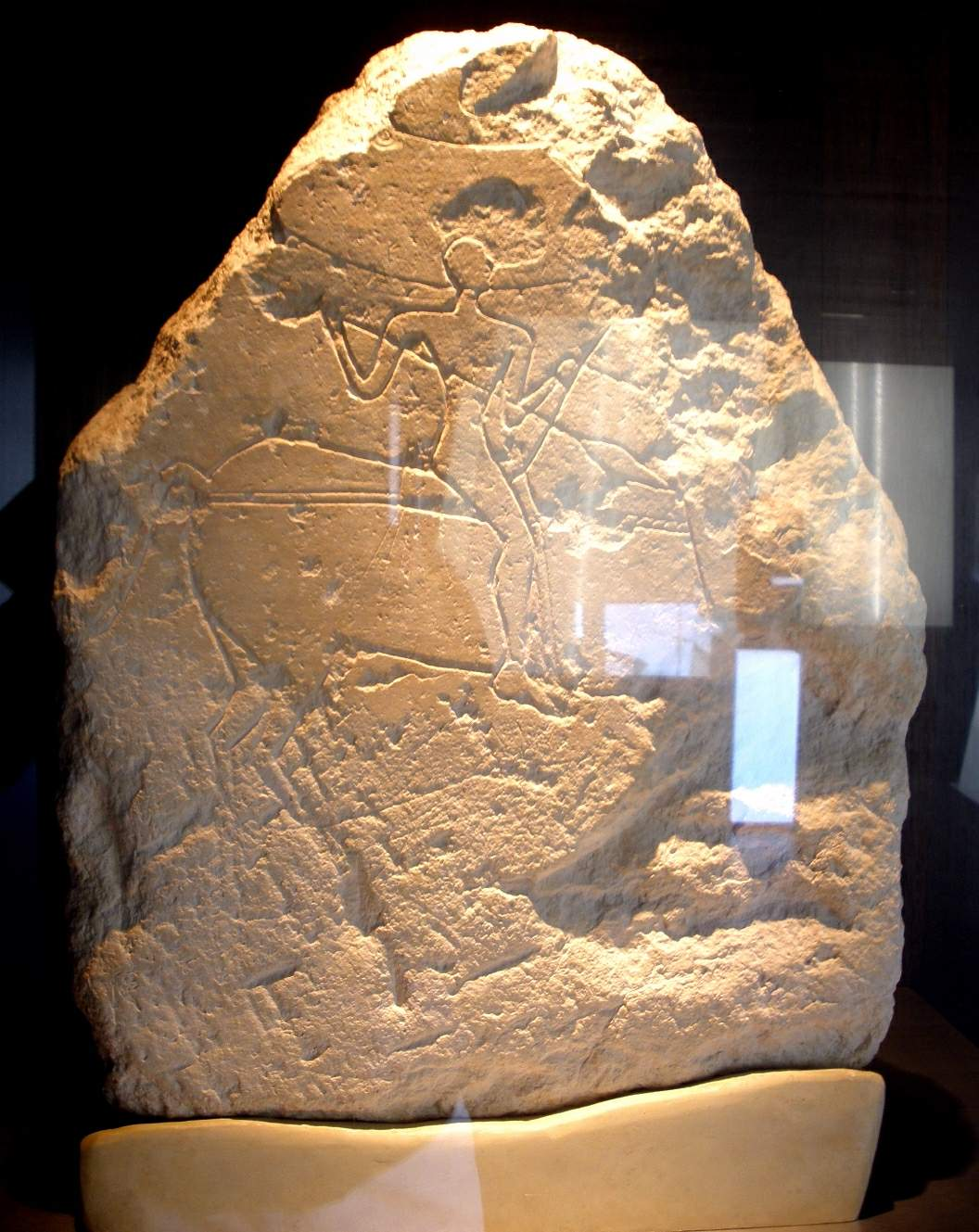 Estela del Jinete, procedente del Oppidum romano de Iruña-Veleia. Se expone en el Bibat Museo de Arqueología de Álava (Vitoria-Gasteiz)